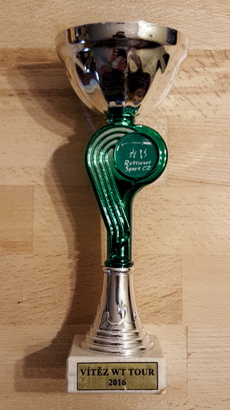 pohár vítěze WT tour 2016